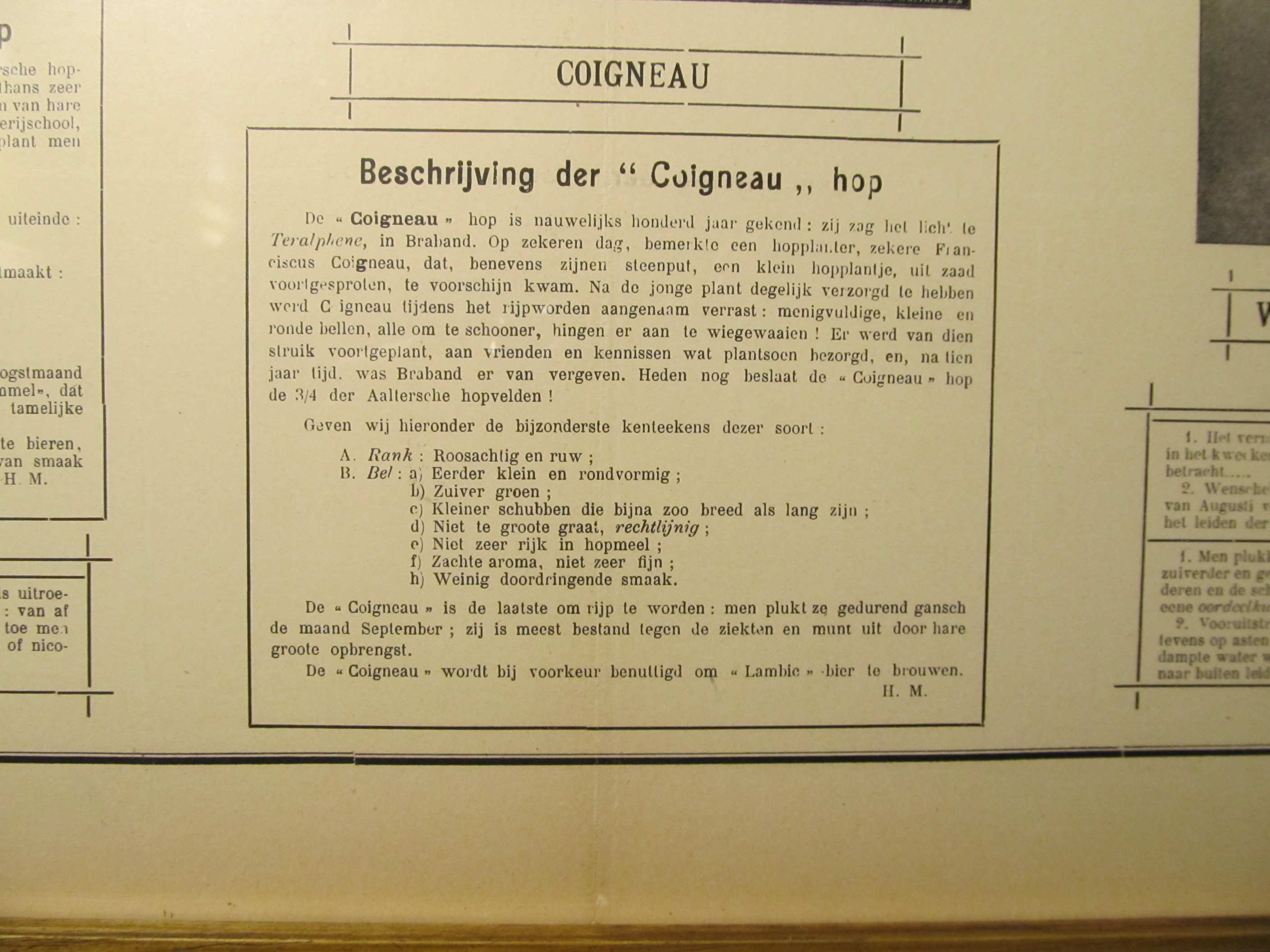 Beschrijving van de Coigneau-hop zoals gepubliceerd in 1908 in het maandblad De Hopboer, het officieel orgaan der Belgische hopbonden. Tentoongesteld in Hopmuseum Poperinge.